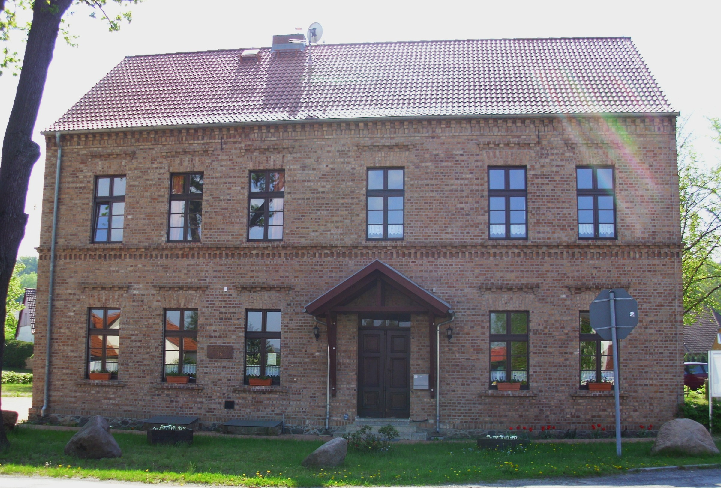 Rathaus von Rauen im Amt Spreenhagen